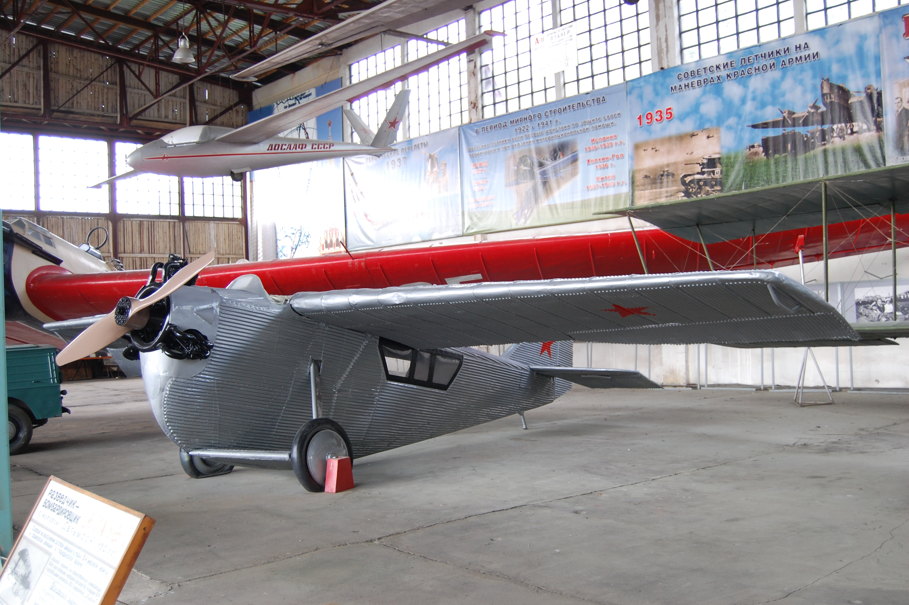 Музей авиации Монино